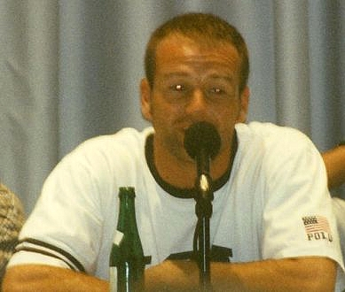 Marcus Marin 1997